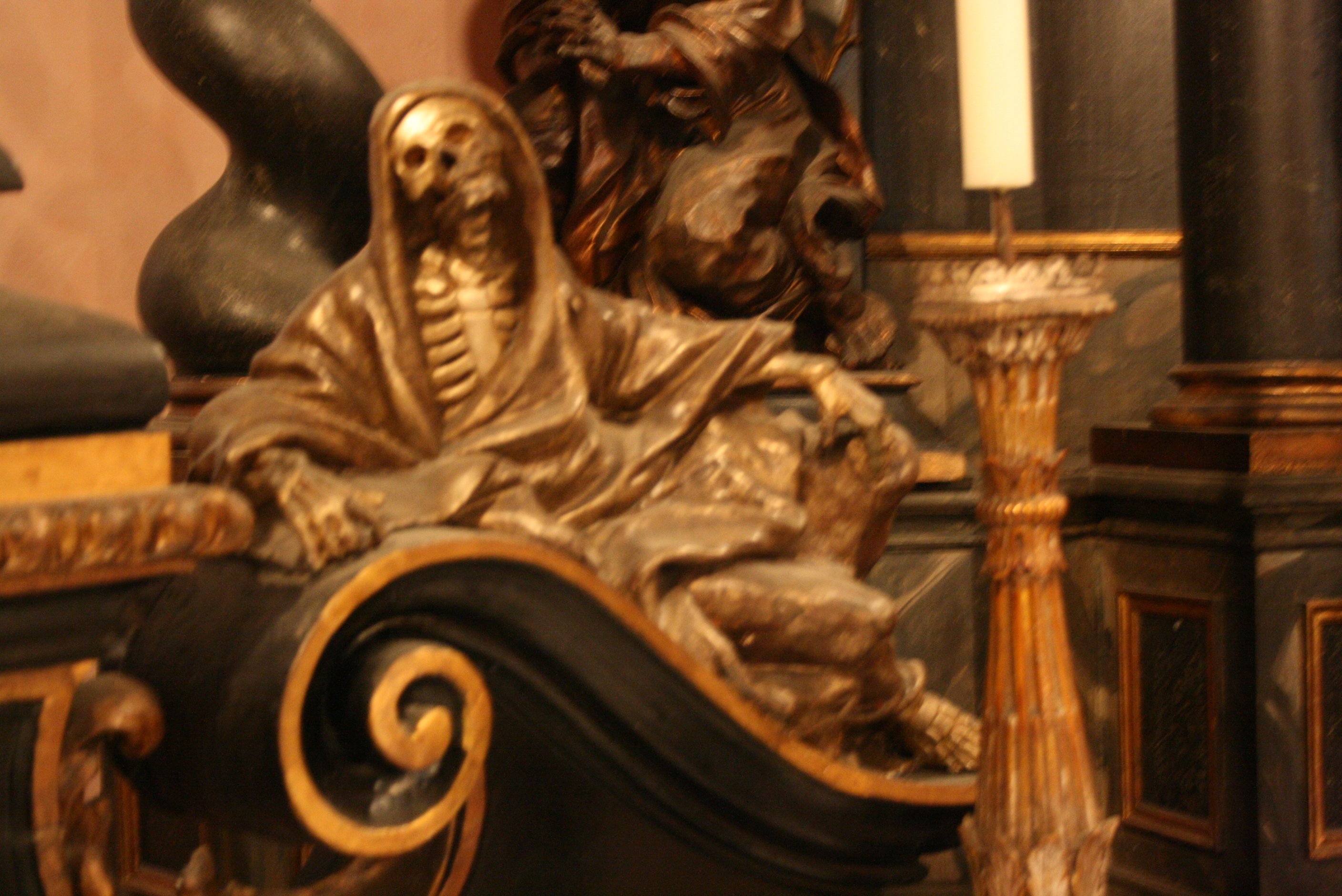 1713 von Giovanni Giuliani geschaffene Altarfigur in der Totenkapelle des Stiftes Heiligenkreuz bei Wien